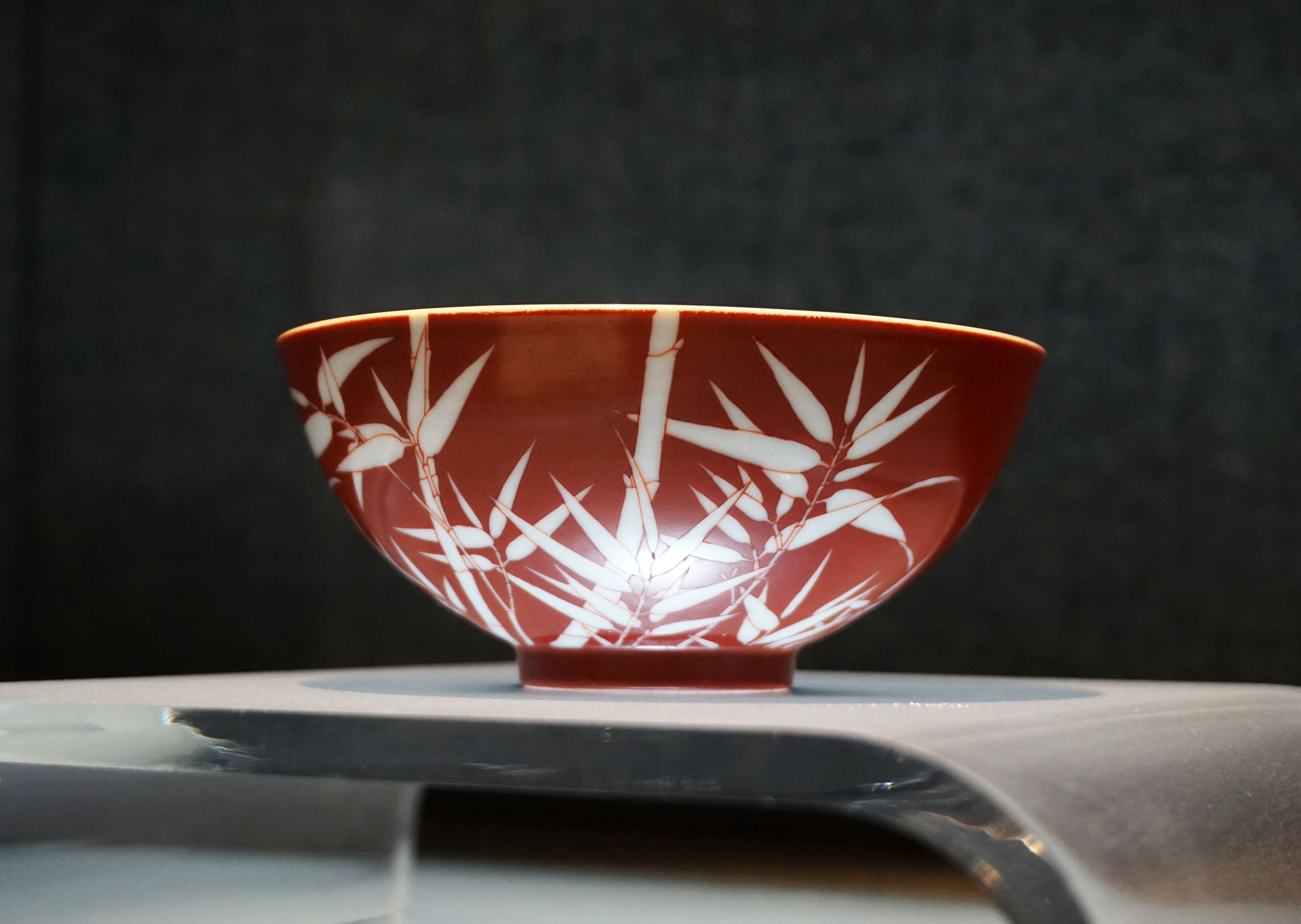 清嘉庆珊瑚红地白竹纹碗。